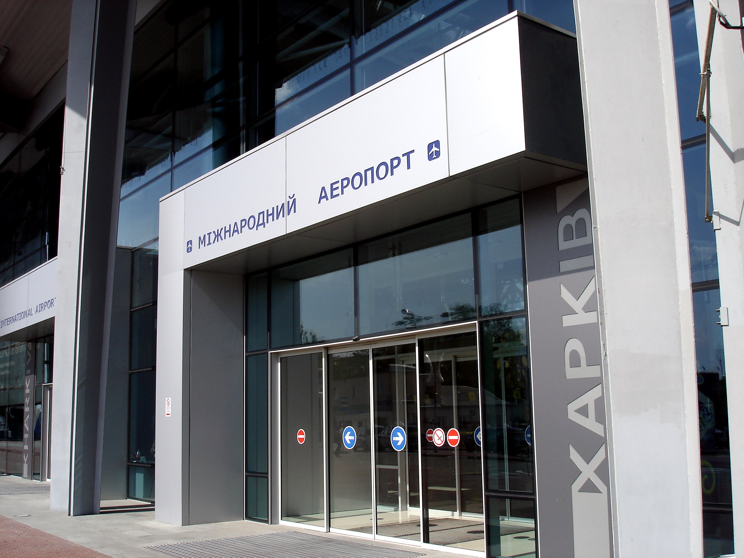 Міжнародний аеропорт «Харків». Пасажирський термінал. Вхід до терміналу.